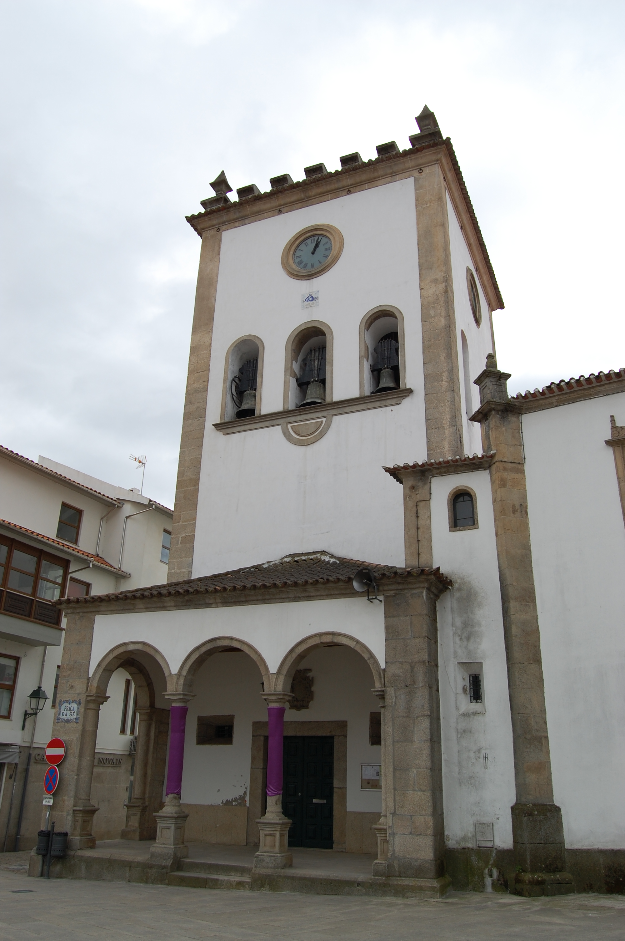 A Sé Velha de Bragança, no nordeste de Portugal.